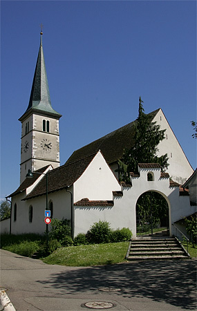 Das ist die Kirche St.Stephan in Therwil, Kanton Basel-Landschaft, Schweiz